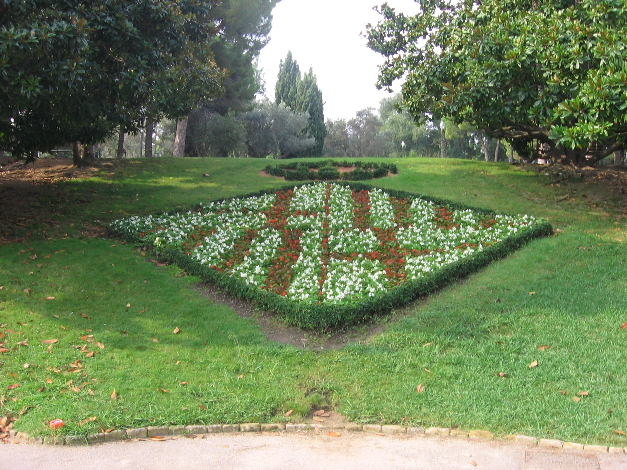 Jardines de Mossèn Cinto Verdaguer, Montjuïc, Barcelona.